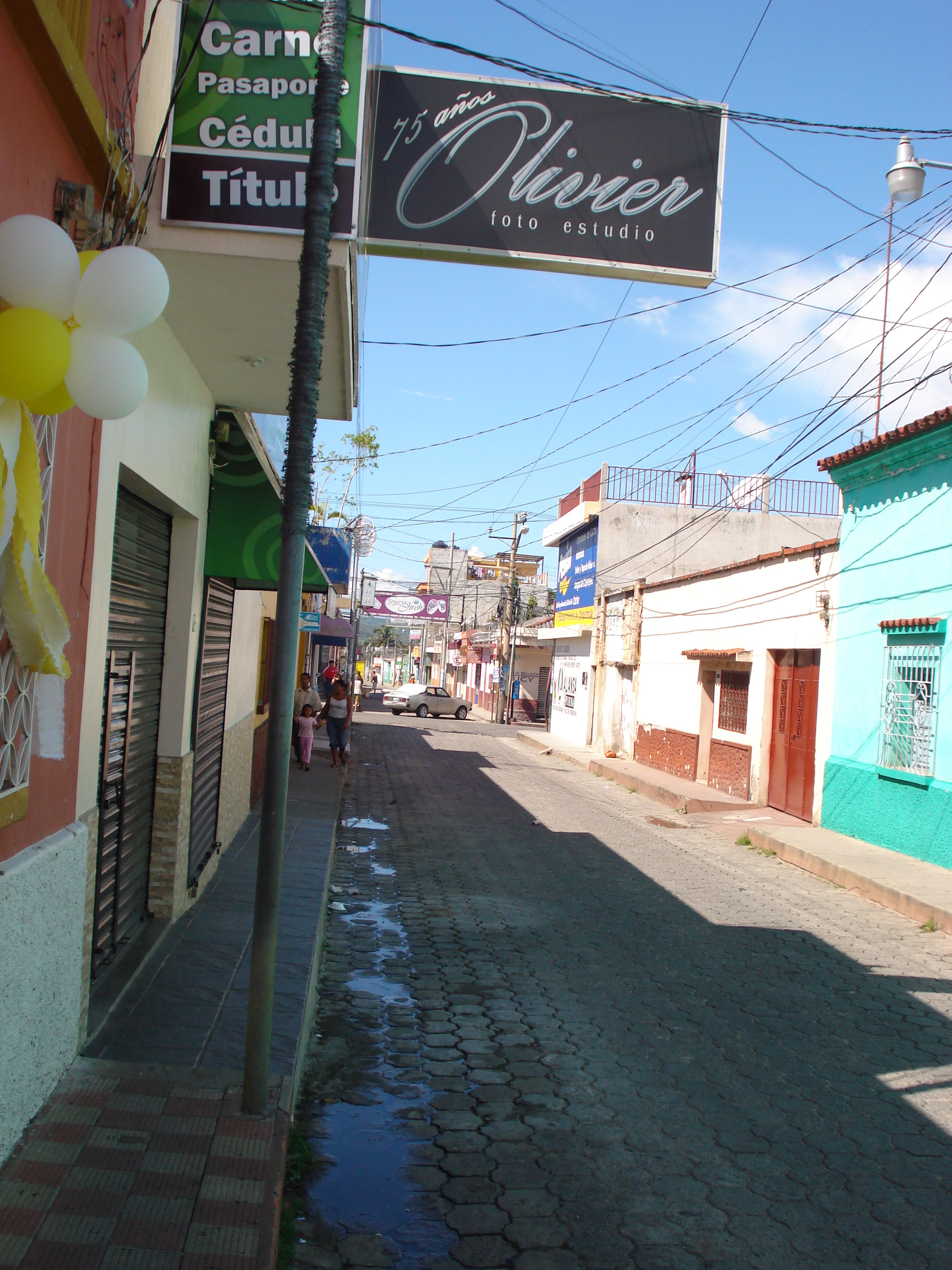 Zona 1: Barrio El Teatro. Conocido y cultural sector de la ciudad de Chiquimula, ubicado en la 9a. Avenida.